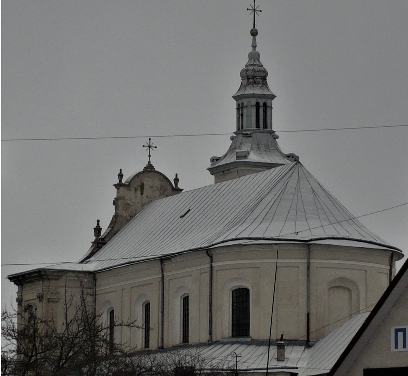 Koscioł Wniebowzięcia Najświętszej Maryi Panny